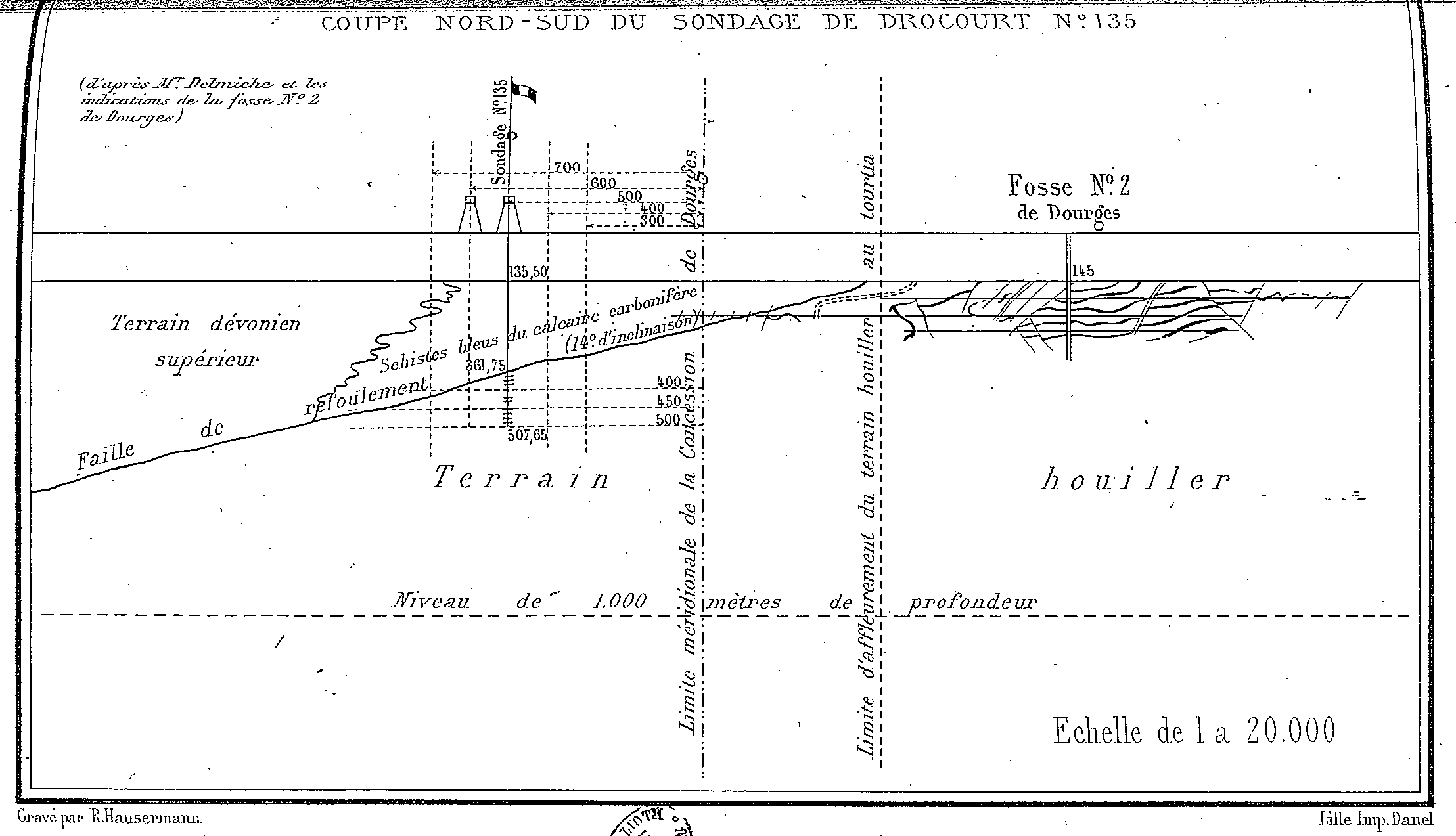 Coupe nord-sud au sondage n° 135 de la Compagnie des mines de Drocourt. La fosse n° 2 est celle des mines de Dourges.